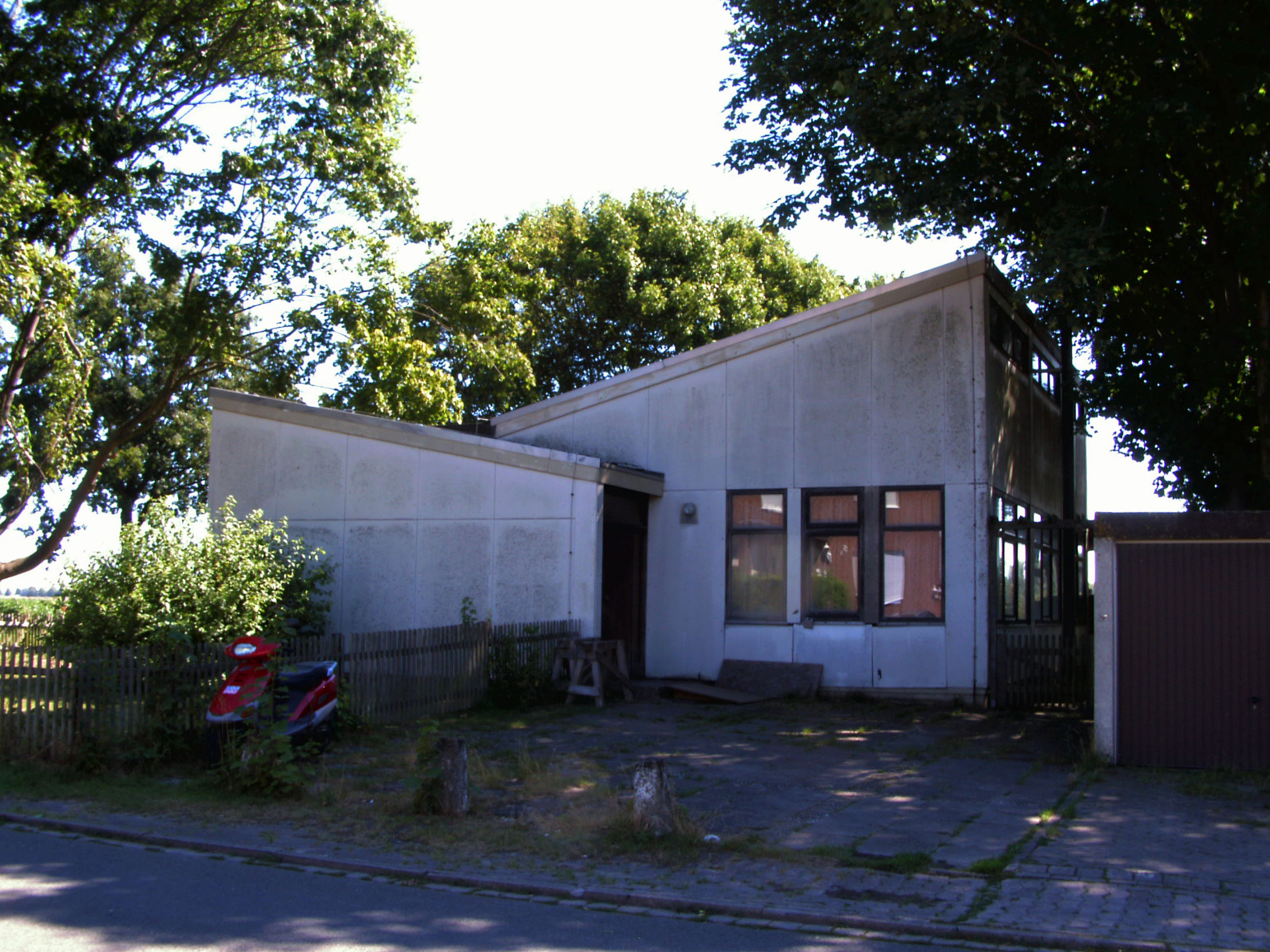 Ehemaliges katholisches Kirchhaus St. Antonius in Lathwehren bei Hannover.